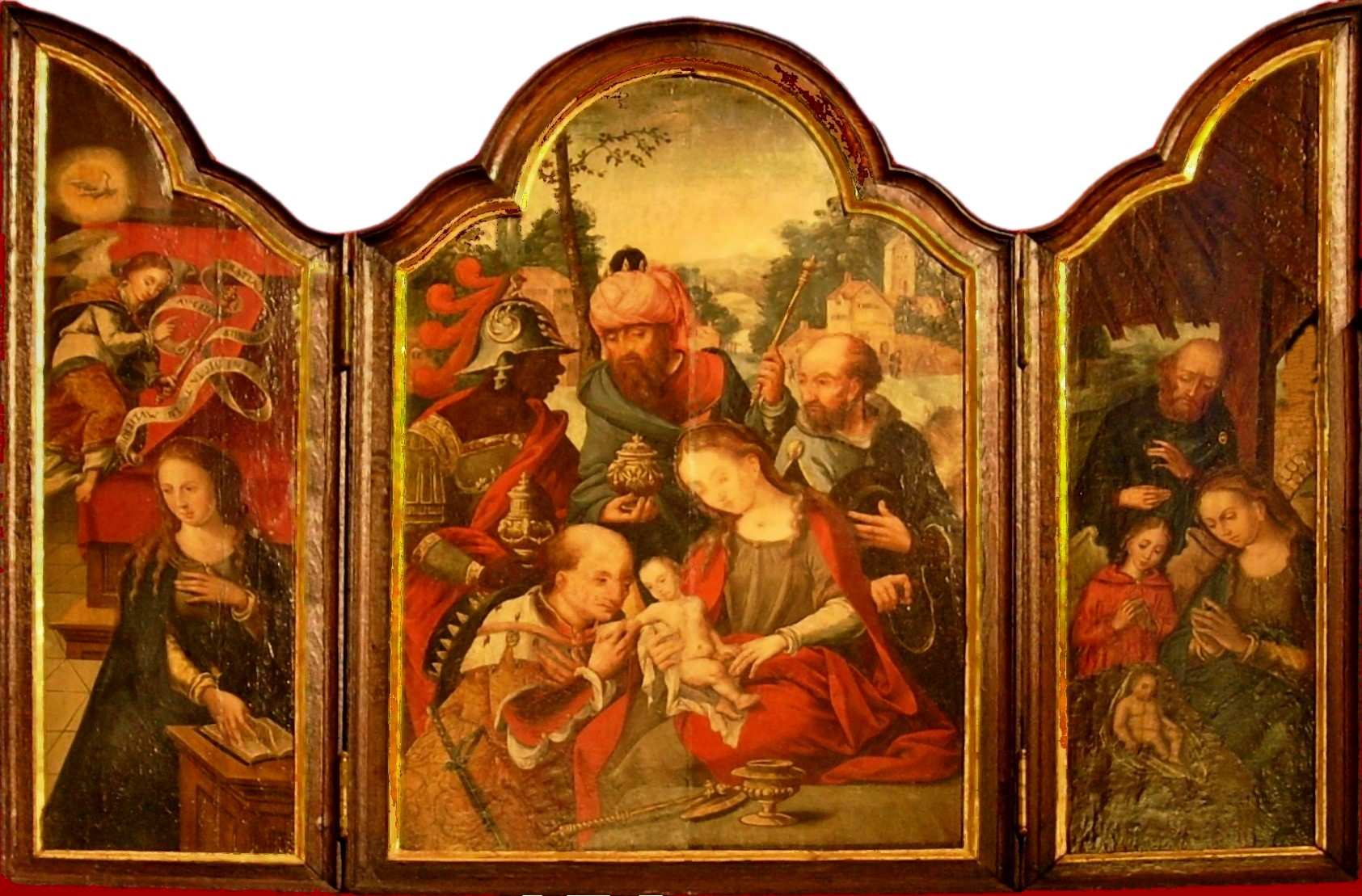 Triptychon